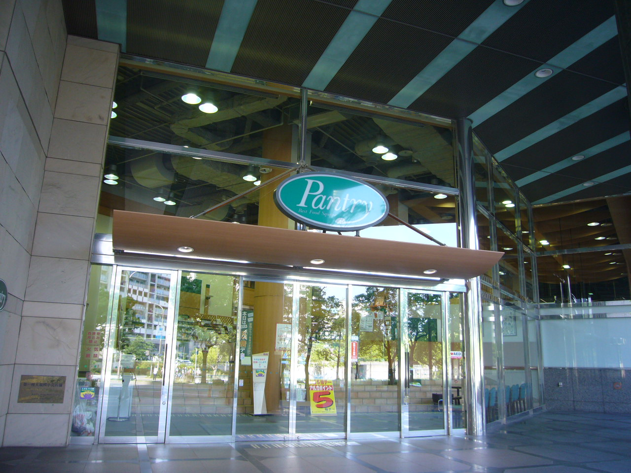 2017年5月撮影。Rink1Fパントリーへの入り口。